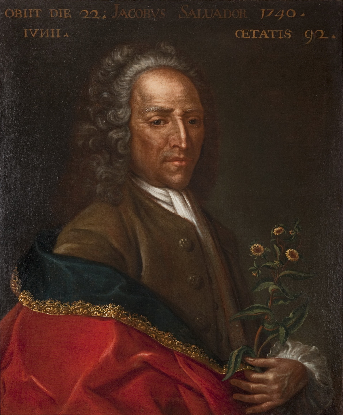 Retrat de Jaume Salvador i Pedrol (1649-1740)